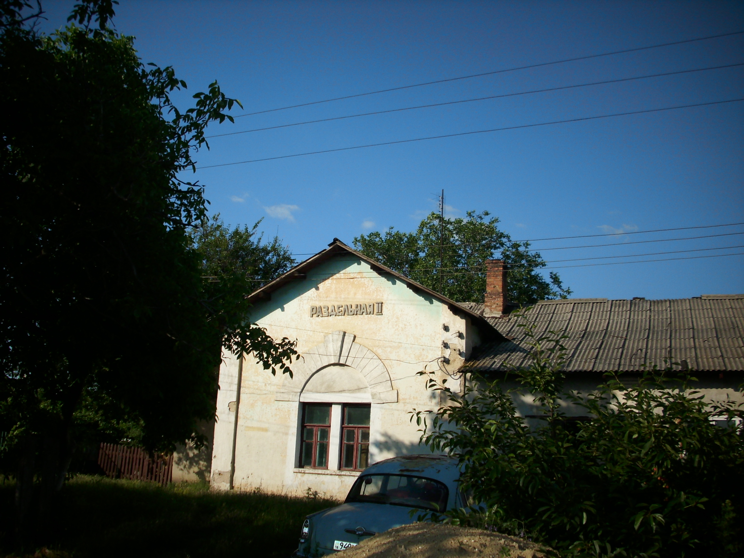 Будівля залізничної станції "Роздільна 2"